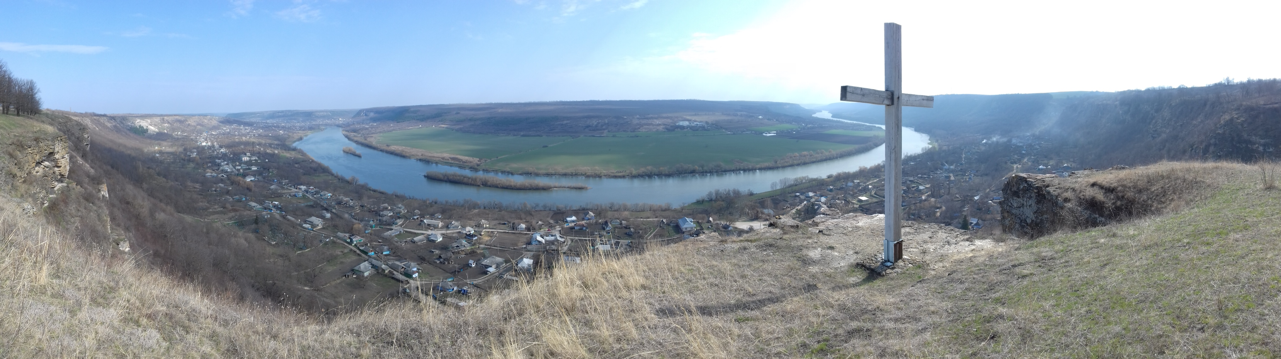 Геологический разрез у с. Сокола, монумент природы, находится в Шолдэнештский район, Юго-западнее с. Сокола (код MD-SD-mn.A-073) A-073